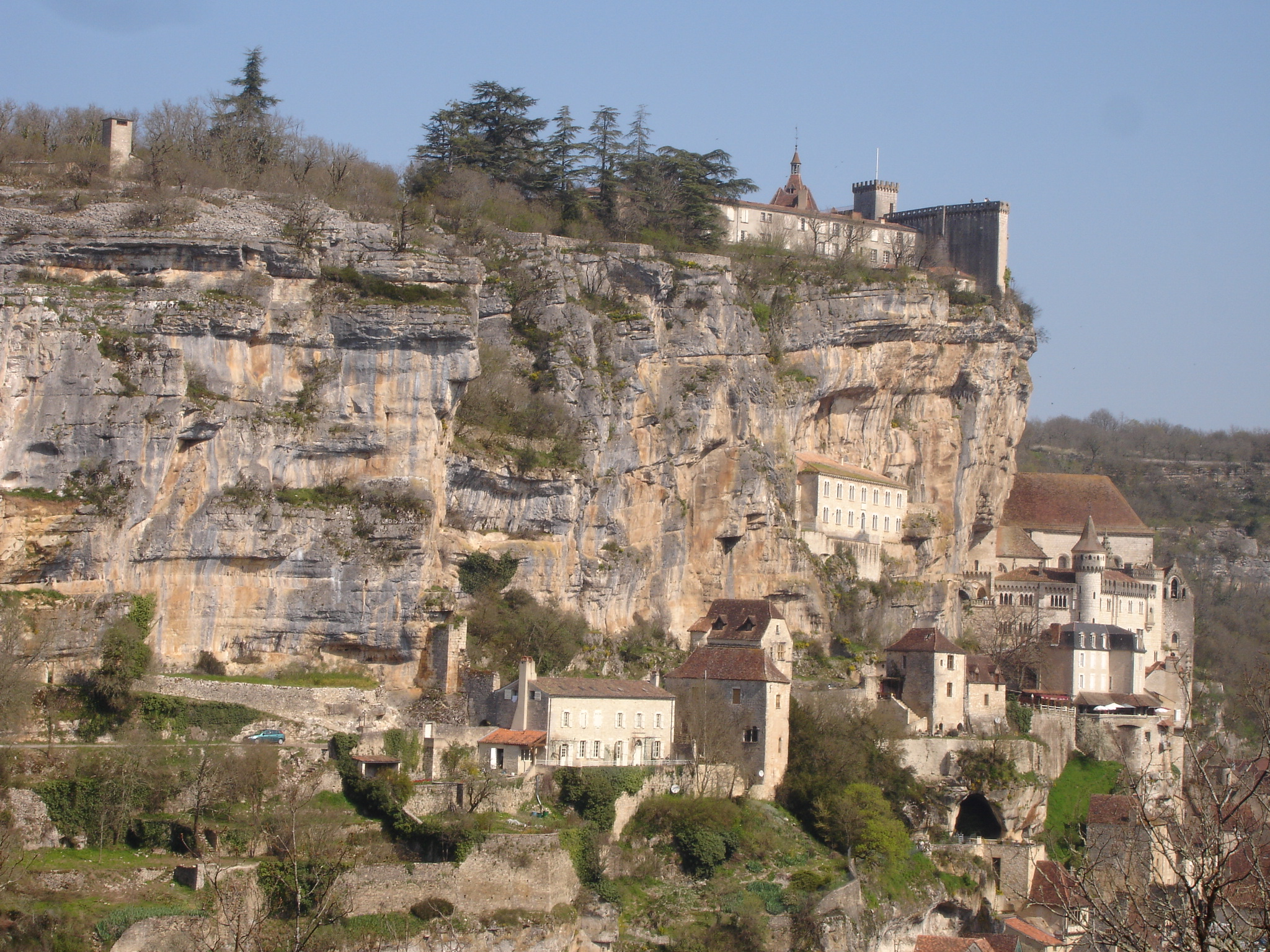 France, Lot (46), Rocamadour